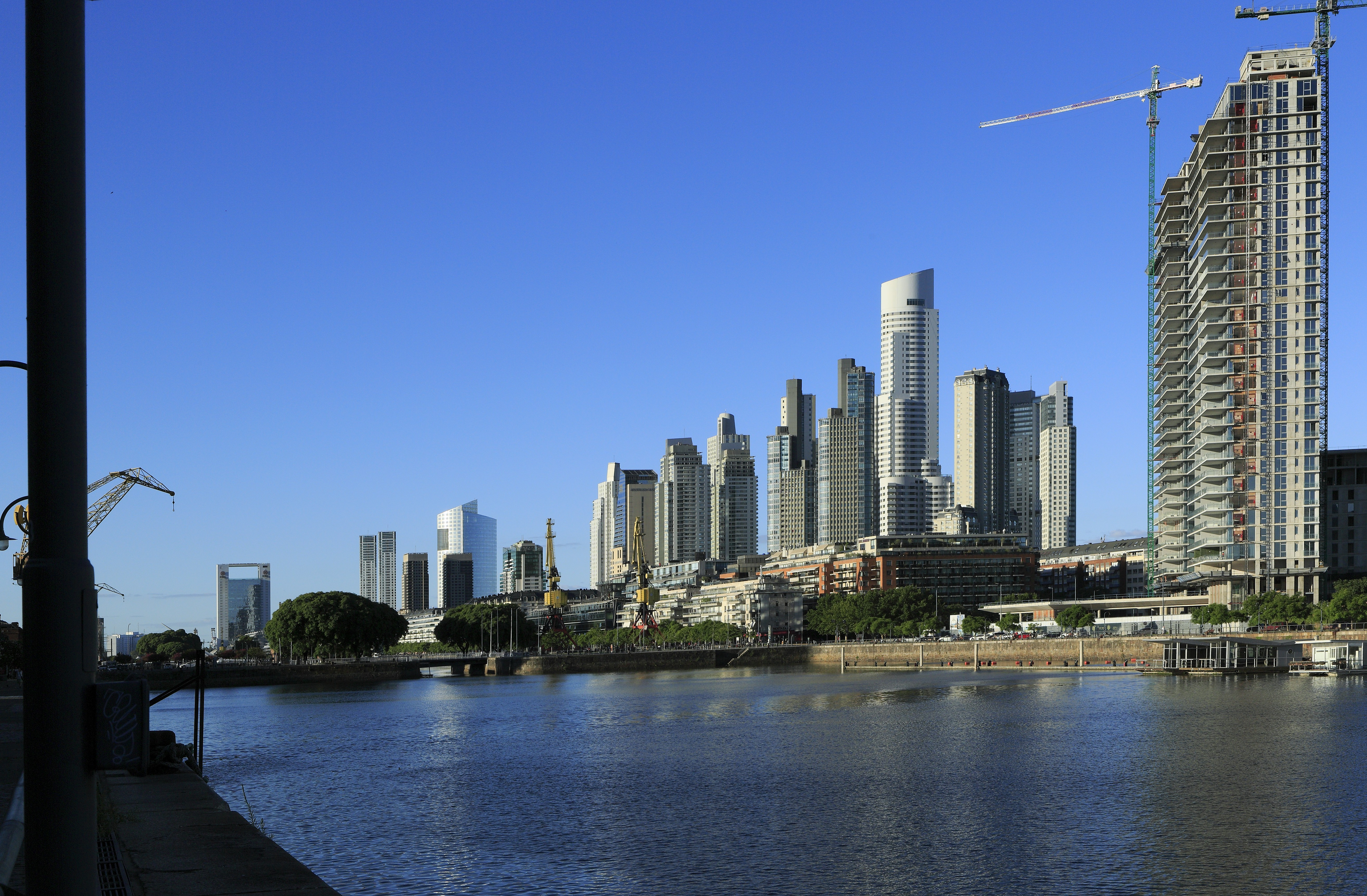 Die Hochhäuser um die Calle Azucena Villaflor zwischen den Hafenbecken von Puerto Madero und der Laguna de los Coipos sind erst in den letzten Jahren gebaut worden und nicht, wie man erwarten würde, Büros, sondern Wohnhäuser.